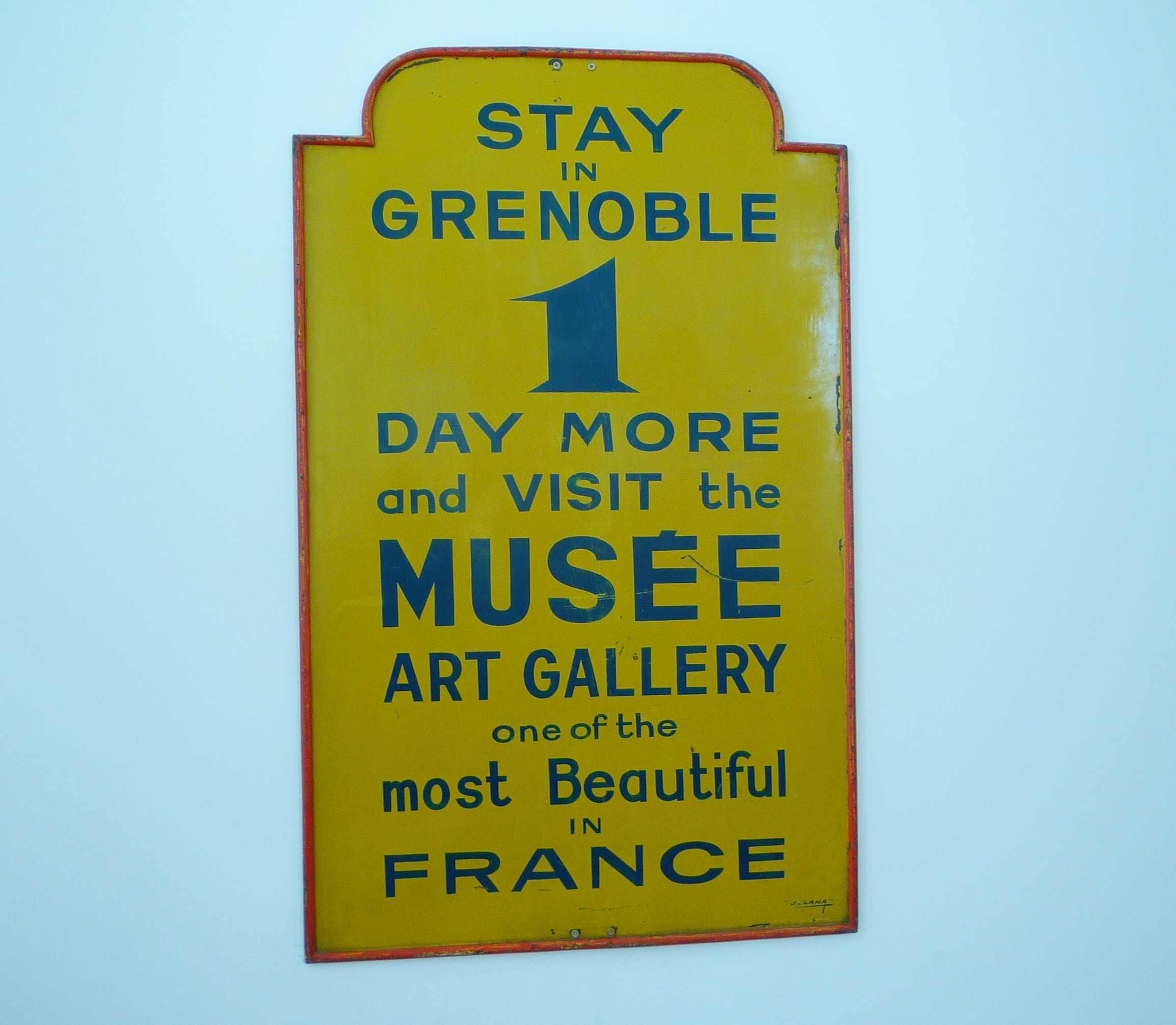 Plaque musée de Grenoble vers 1930. Exposée en 2019 lors de l'hommage à Andry Farcy pour le centième anniversaire de sa prise de fonction comme conservateur du musée.